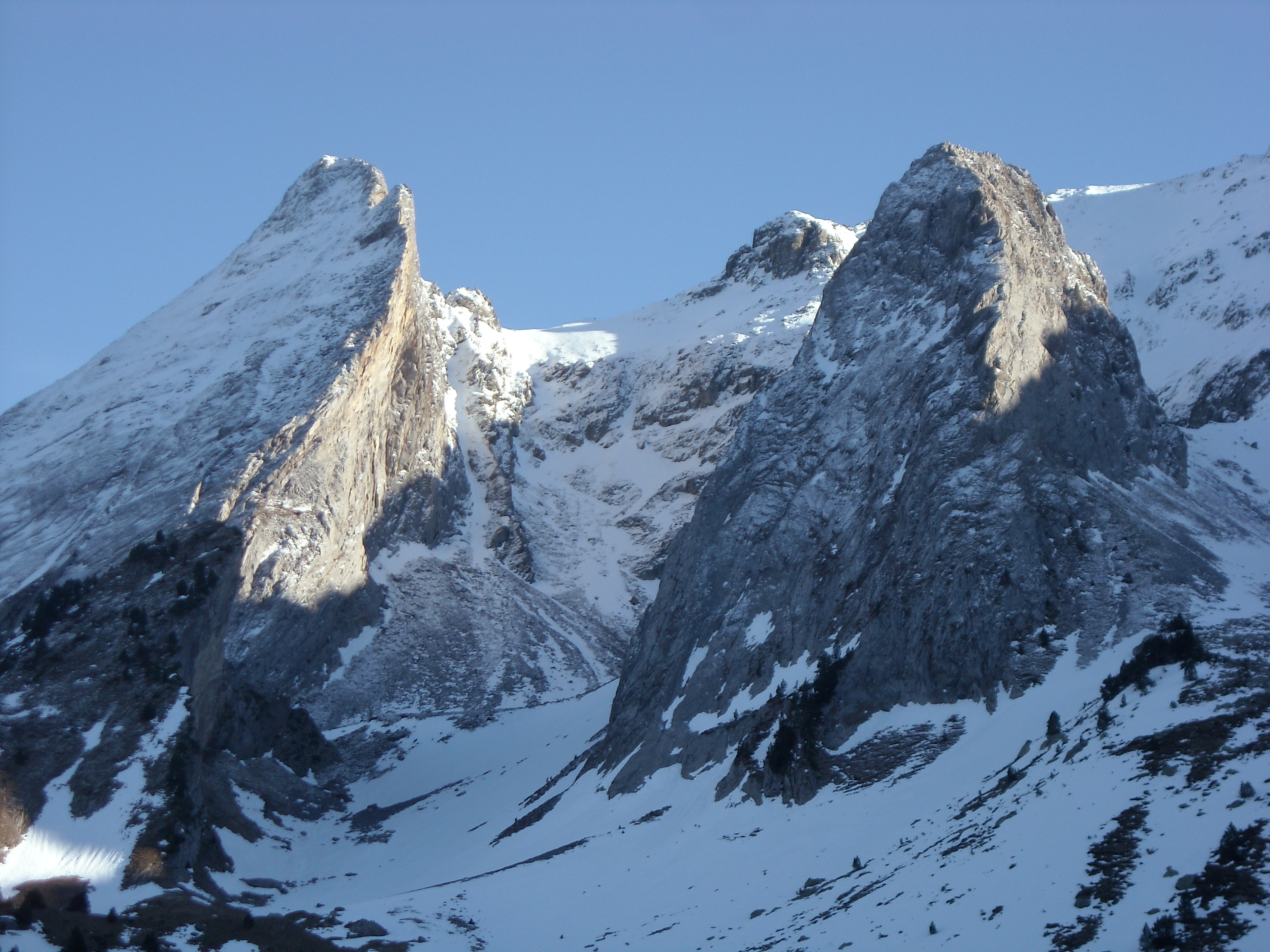 Tuc des Hemnes e Labada de Sarrahèra